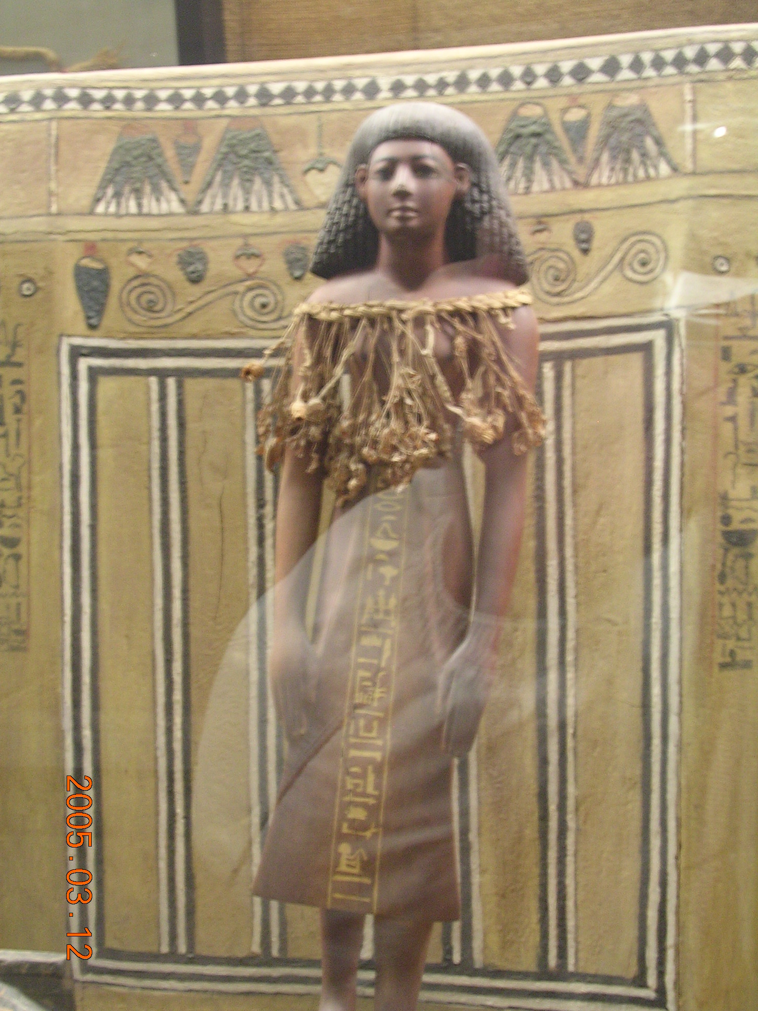 Kha halotti szobra (Olaszország, Torino, Museo Egizio)